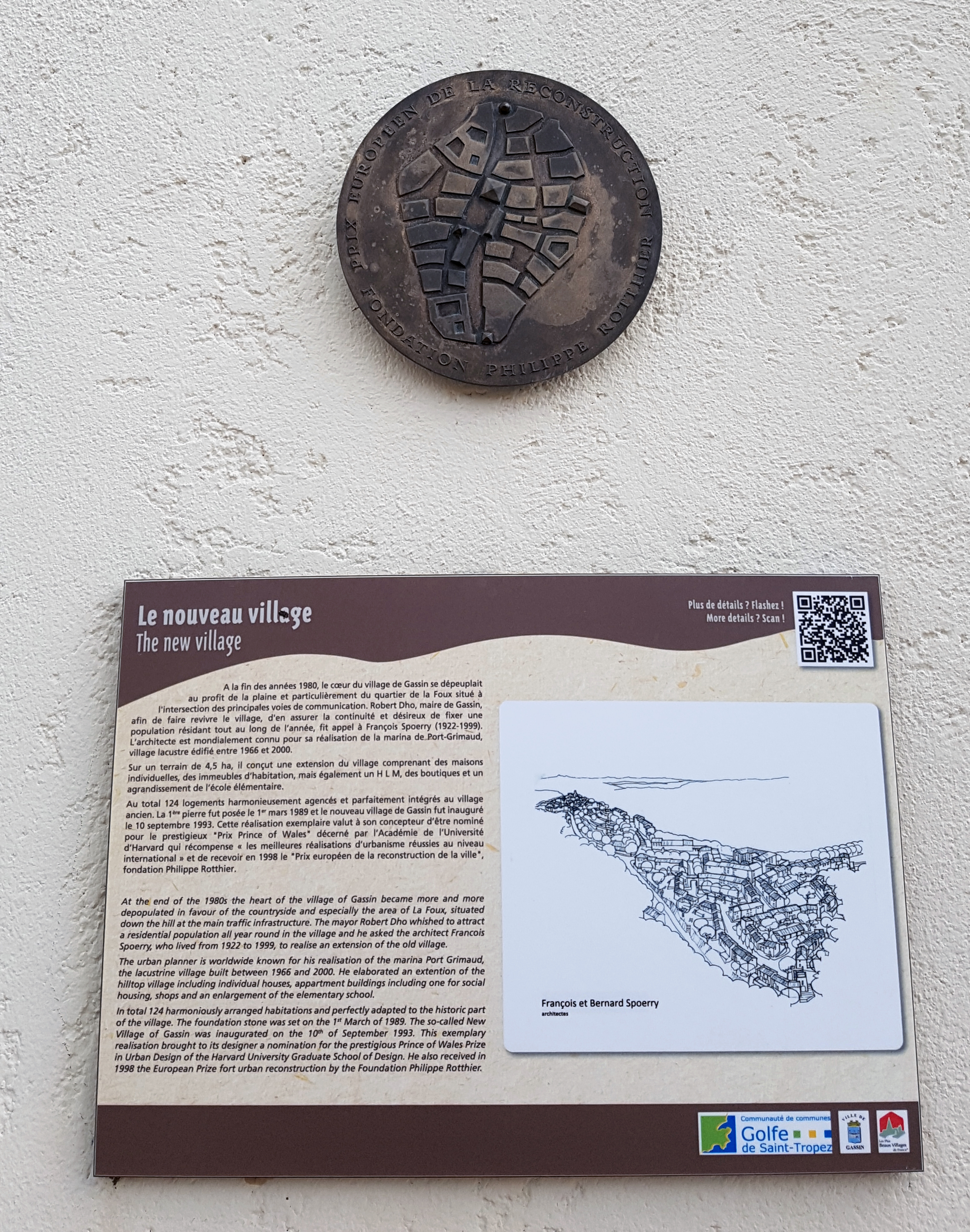 Vue de la médaille du prix européen Philippe Rotthier à l'entée du nouveau village de Gassin et plaque touristique explicative